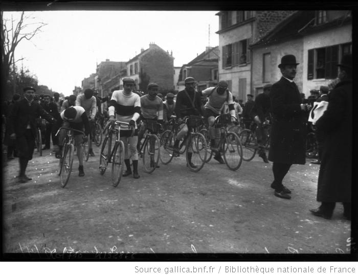 Paris-Roubaix, en ligne pour le départ, 19/4/08